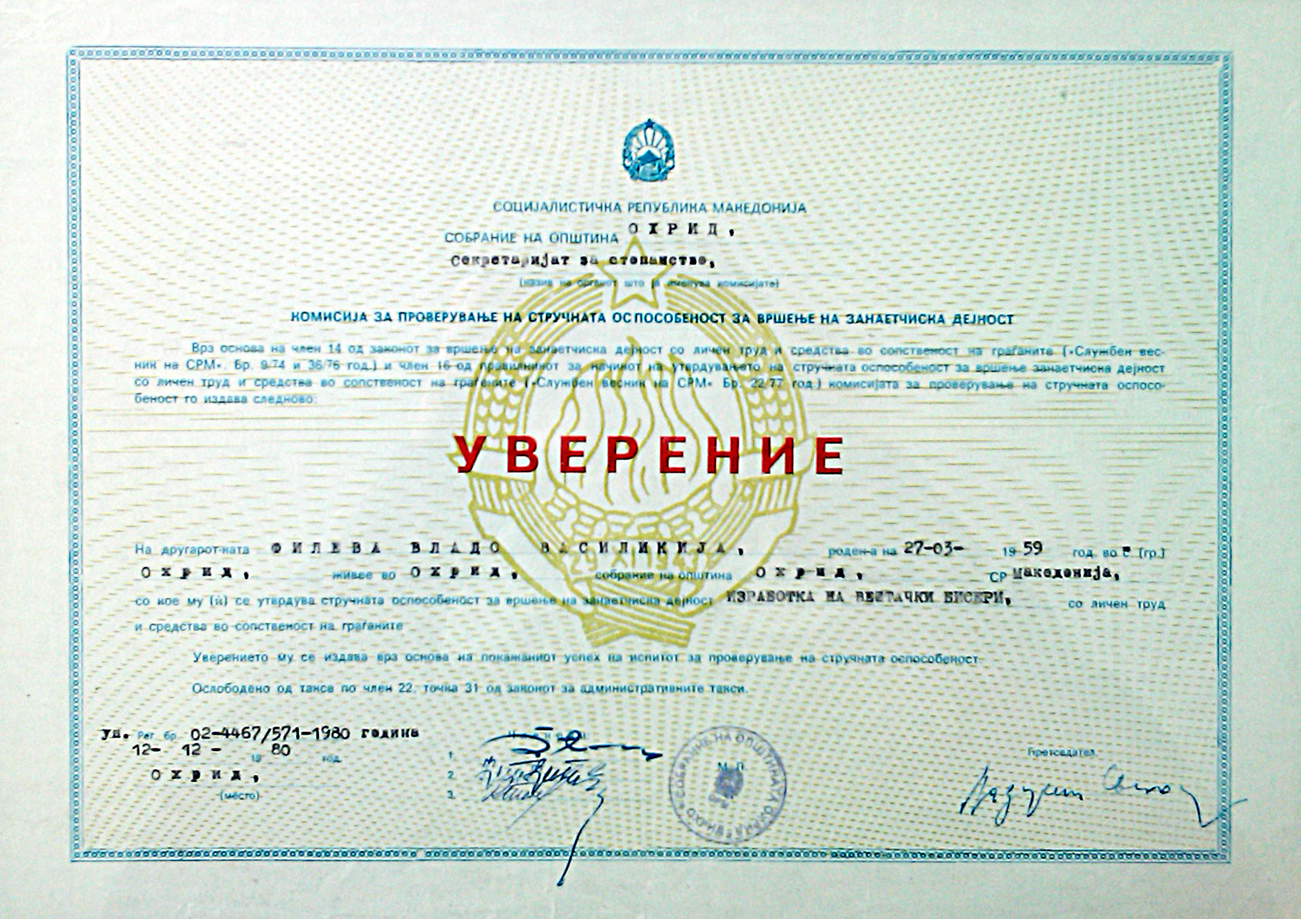 Уверение